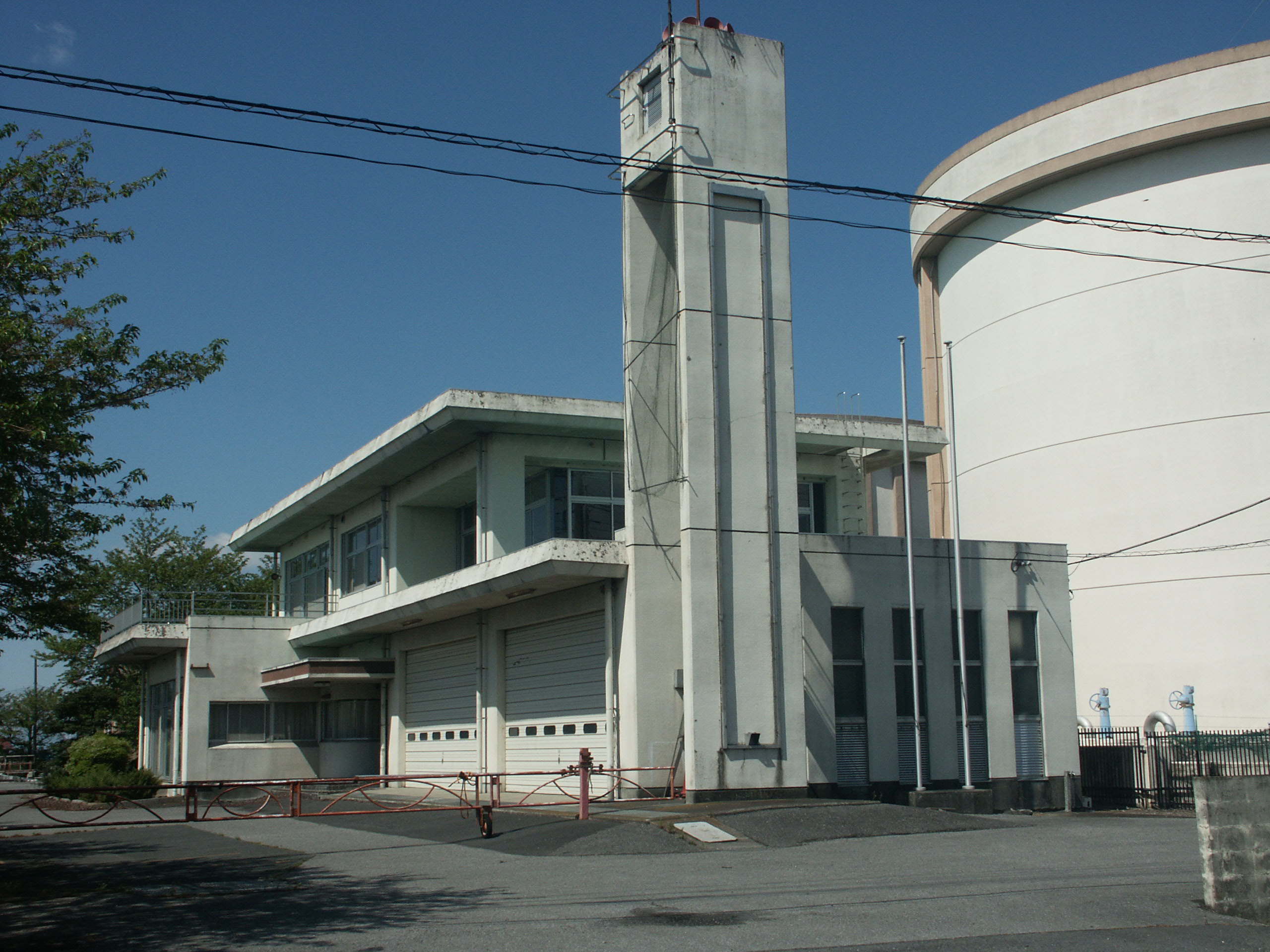 旧幸手市消防本部幸手市消防署東分署庁舎